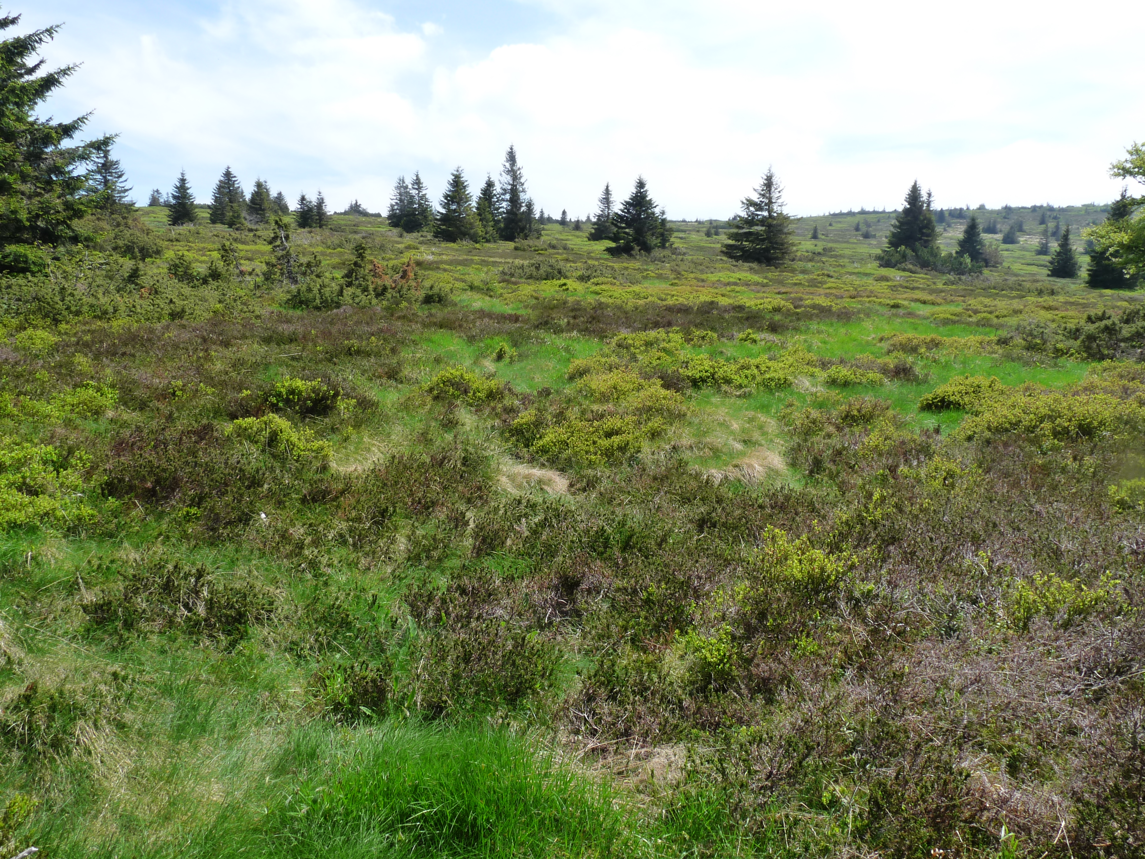 Vosges (communes de Plainfaing et du Valtin) : Réserve naturelle du Tanet-Gazon du Faing